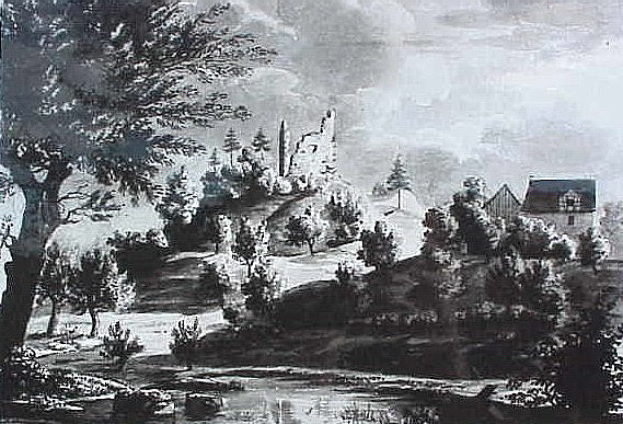 Regensdorf (ZH): Ruine der Burg Regensberg (Altburg) (Freiherren von Regensberg), Aquarell um 1840 von Ludwig Schulthess (1805-44)